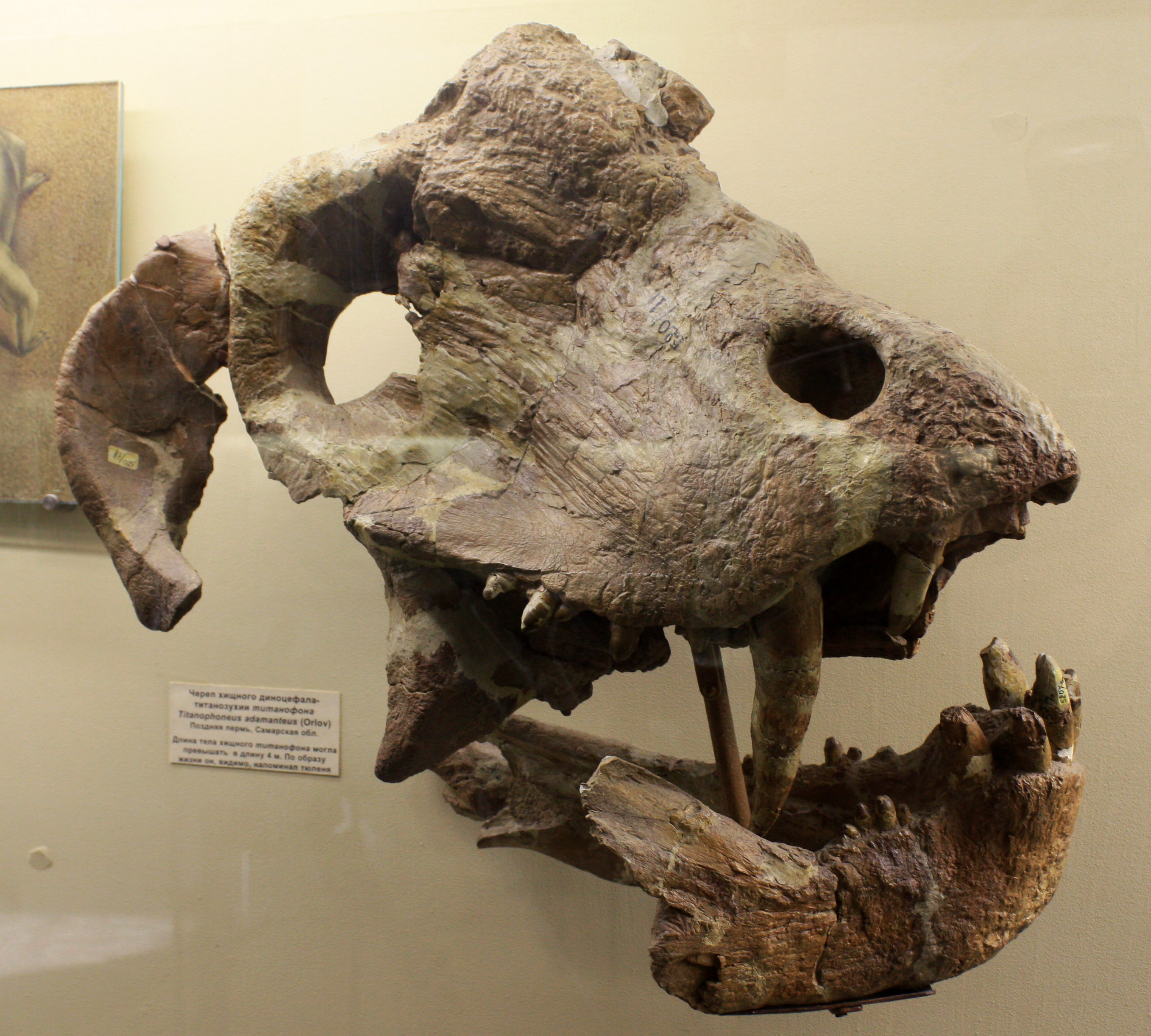 De scheldel van Titanophoneus.